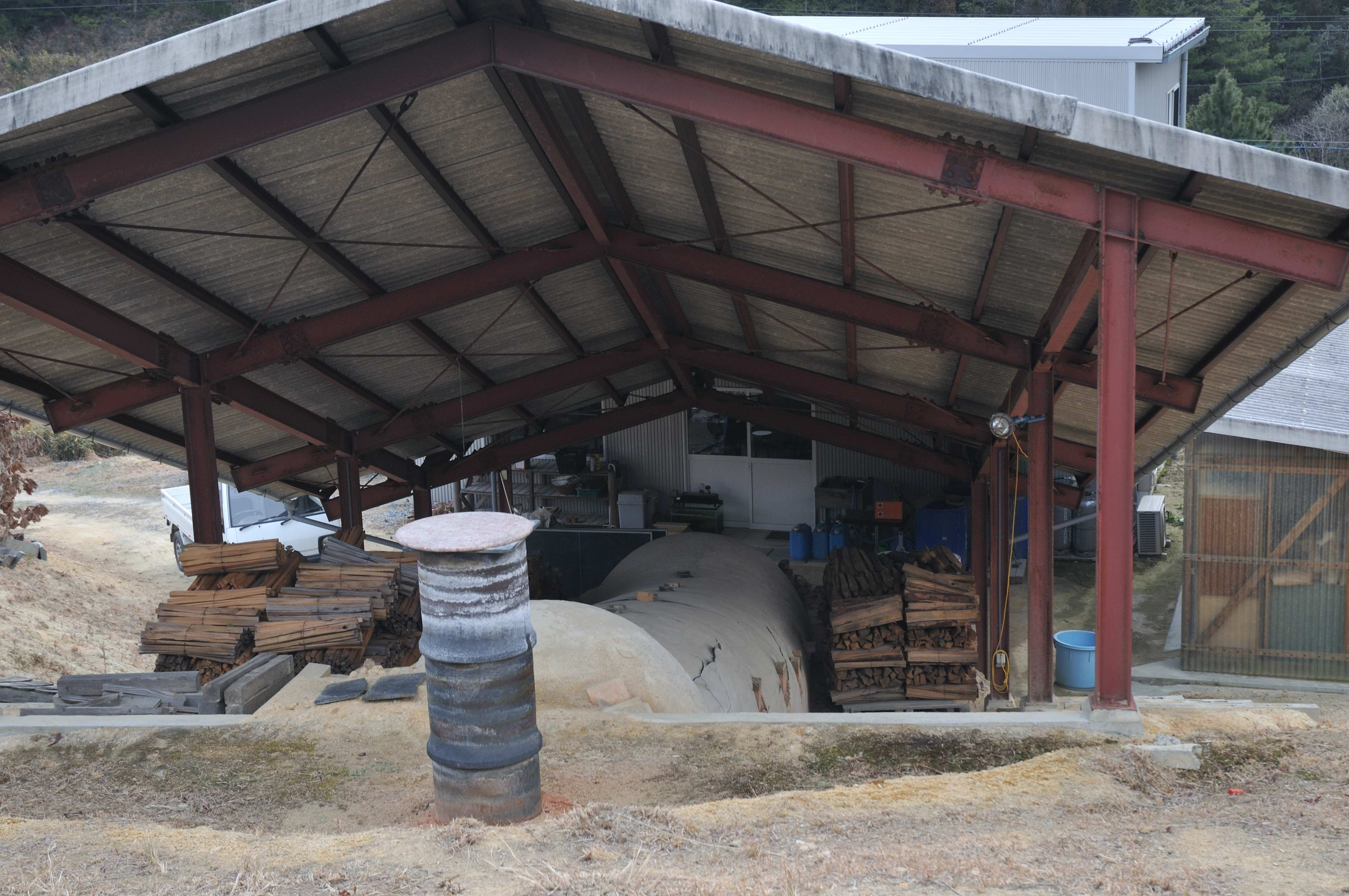 climbed kiln of Bizen-yaki